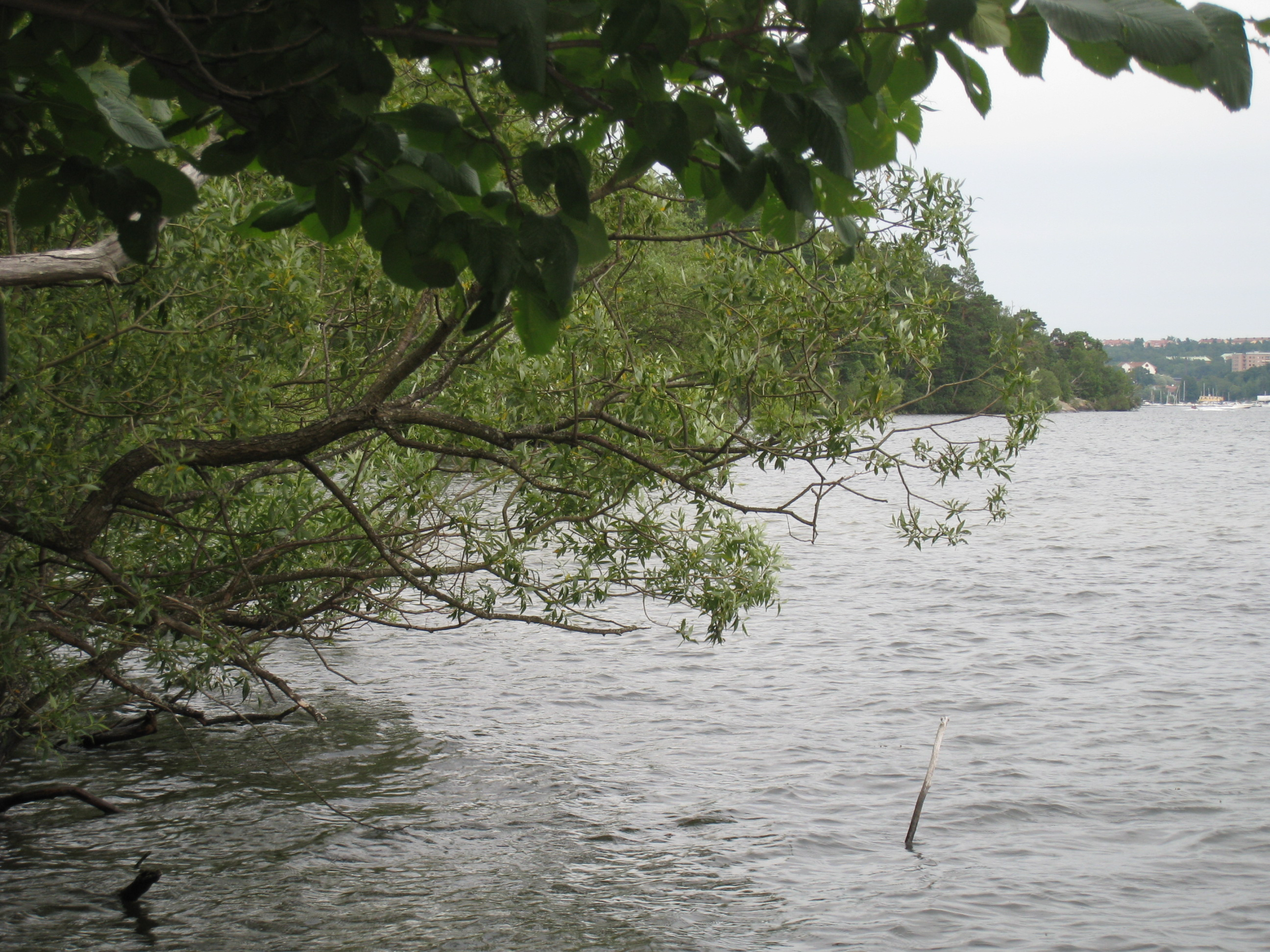 Ålstensparkens natur vid Mälaren i stadsdelen Ålsten i södra Bromma väster om Stockholm.